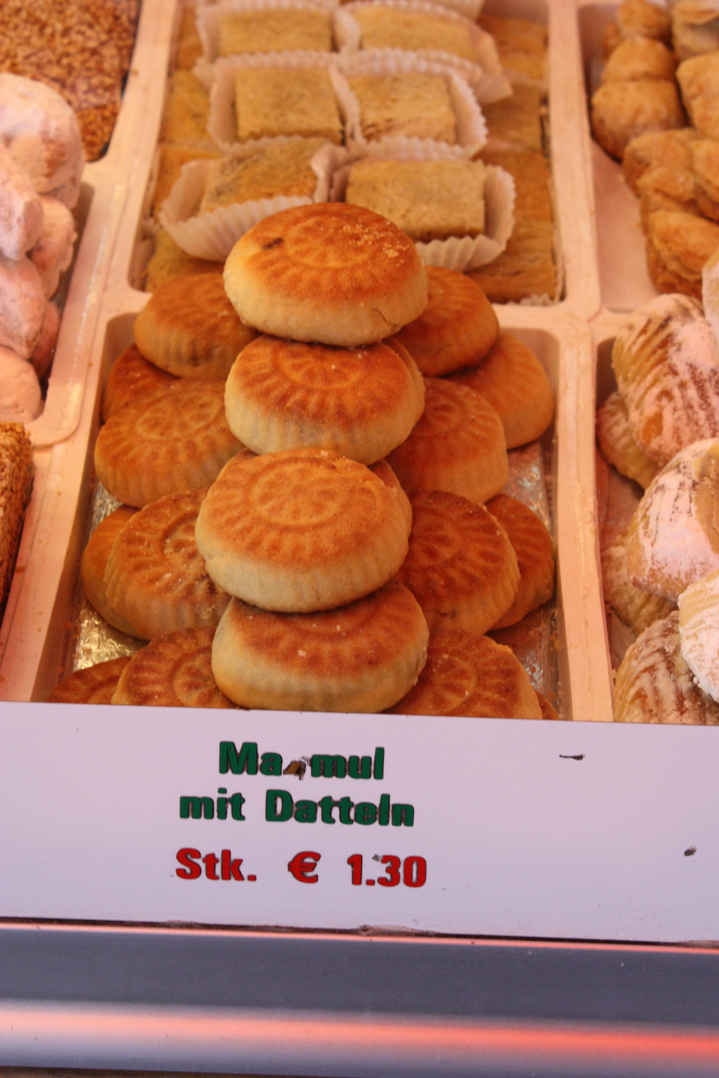 Naschmarkt, Vienna, Wien